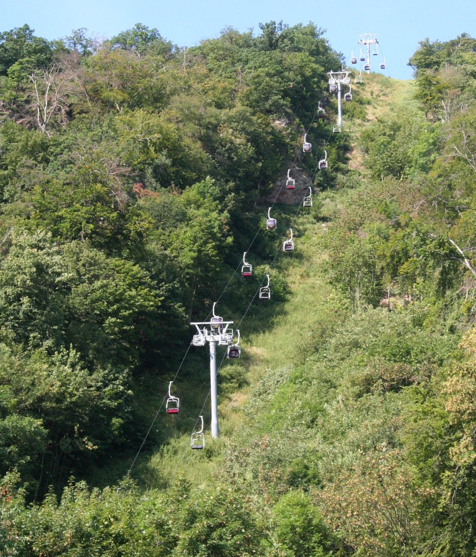 Sessellift zur Rosstrappe